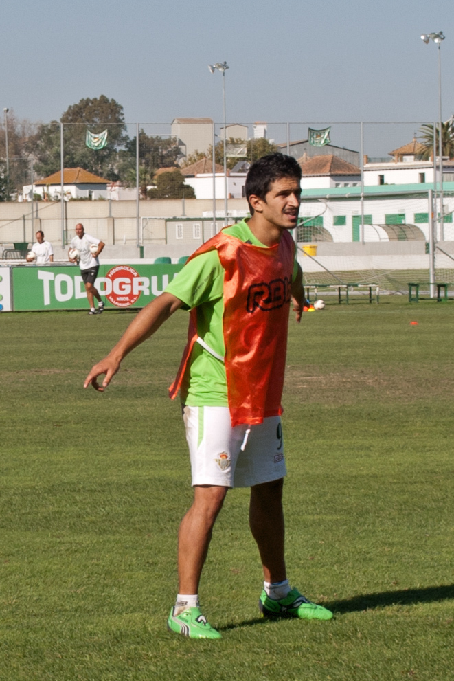 Jonathan Pereira, ciudad deportiva del Real Betis en octubre de 2011.